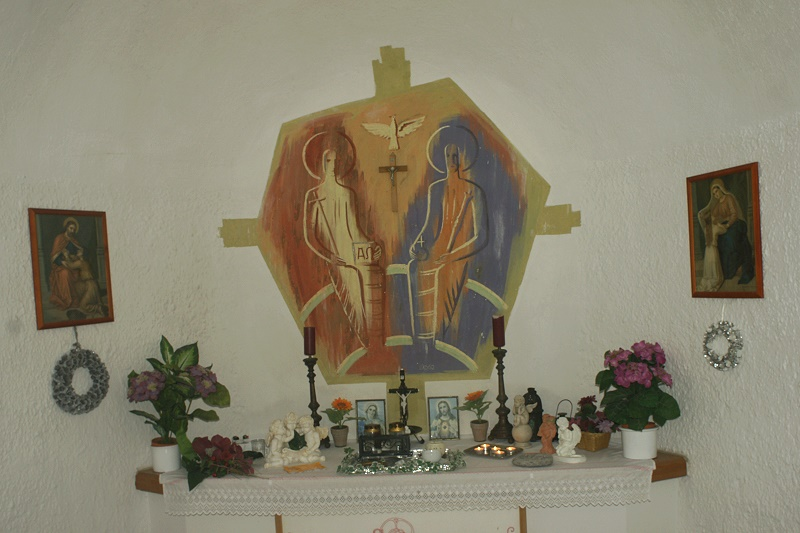 Dreifaltigkeitskapelle, Klimmkapelle Innenansicht